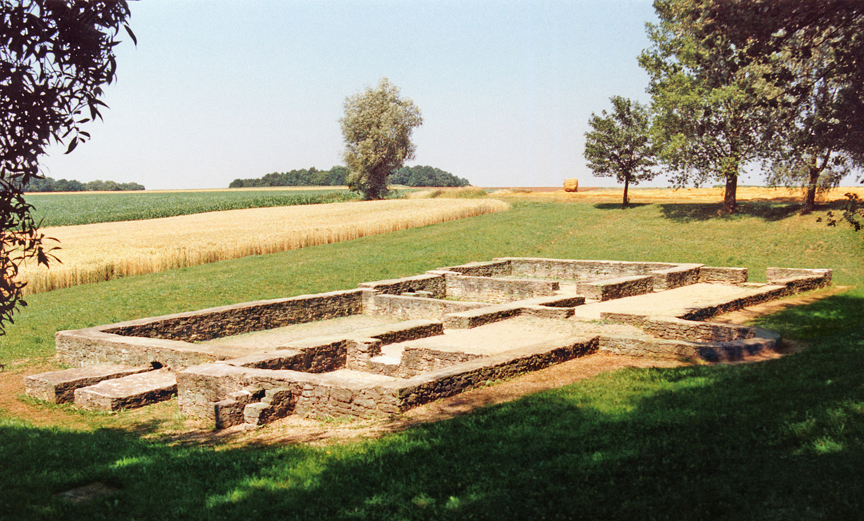 Blick auf das restaurierte Kastellbad von Theilenhofen, Bayern.